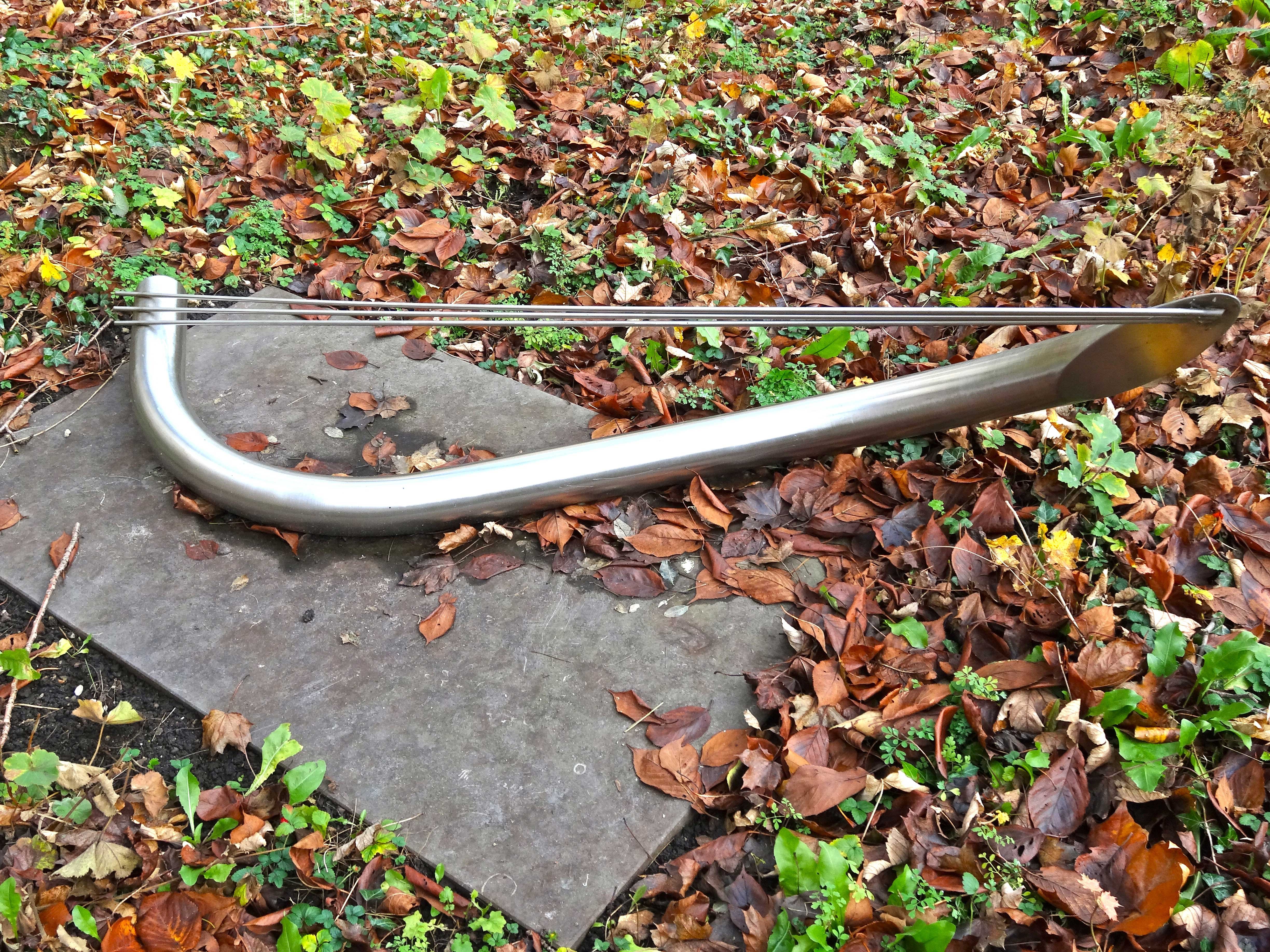 Wave door Menno Meyer - Catharijnatuin Achter de Kerk Gouda